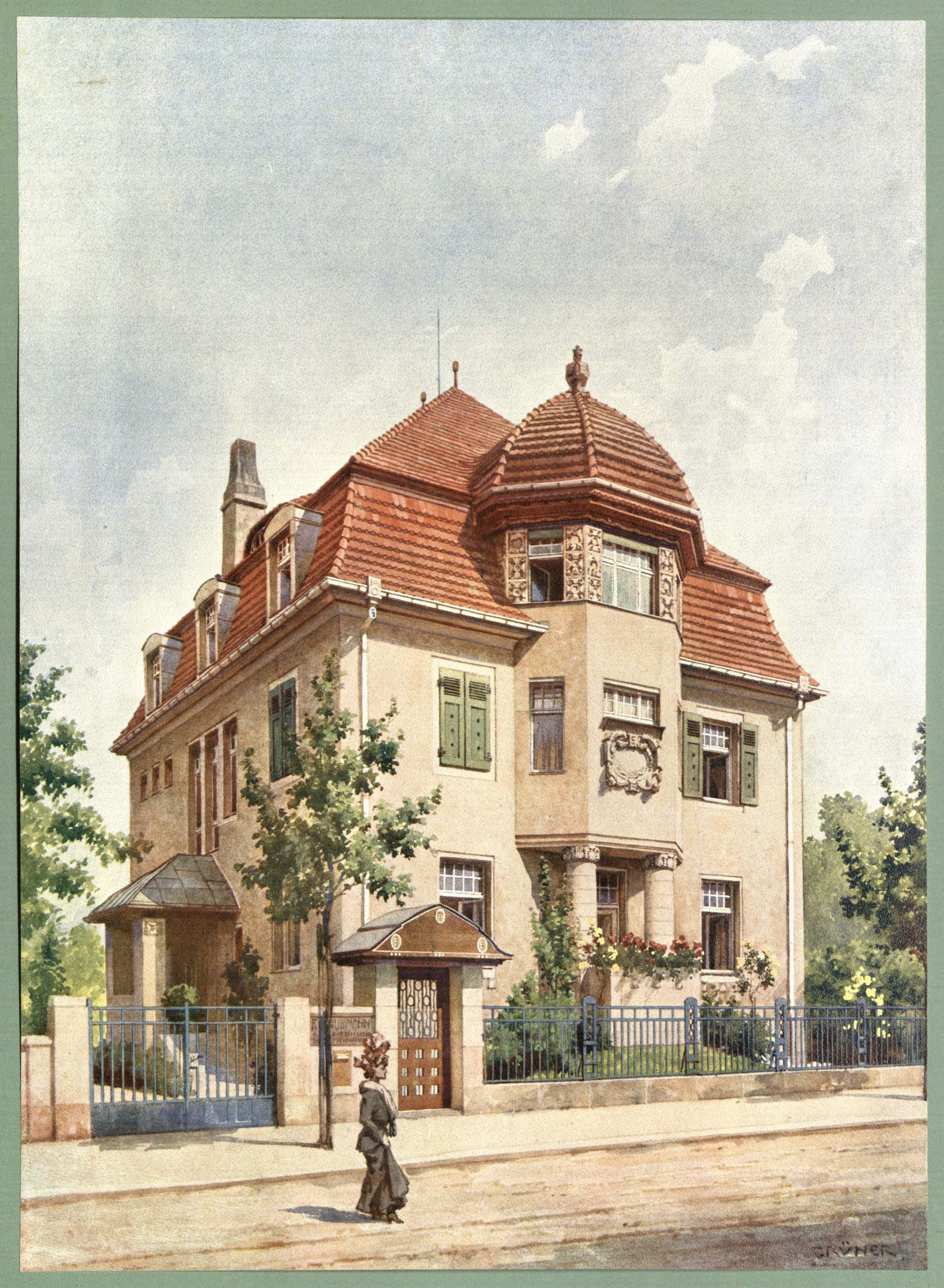 Mehrfamilienwohnhaus Pohlandstraße 15 (ursprünglich Hausnummer 9) in Dresden-Striesen; erbaut 1905-1906 nach Entwurf des Architekten Max Herfurt; unter Denkmalschutz